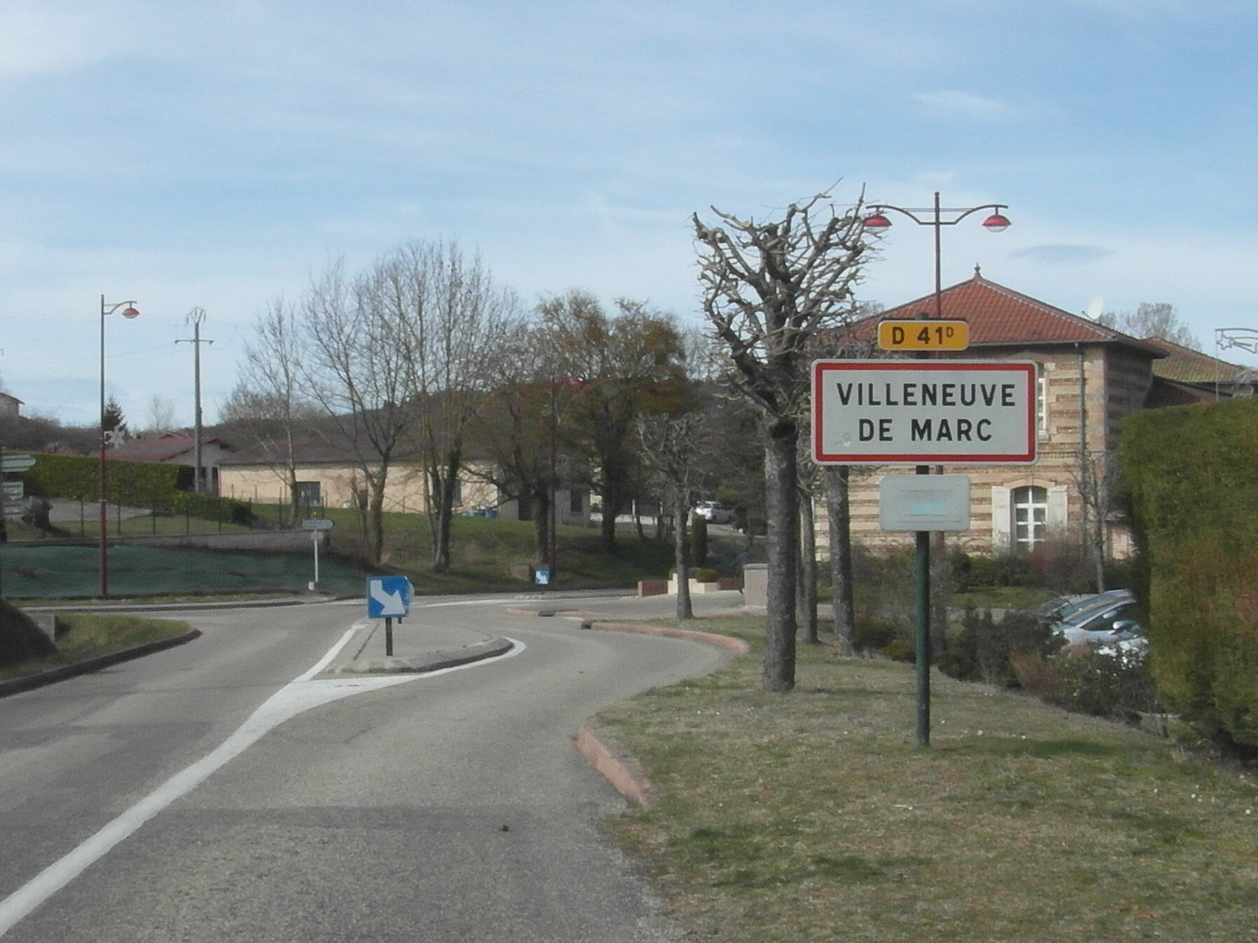 Entrée de Villeneuve-de-Marc en mars 2019